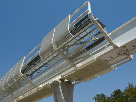 Cantiere del People Mover al Lazzaretto